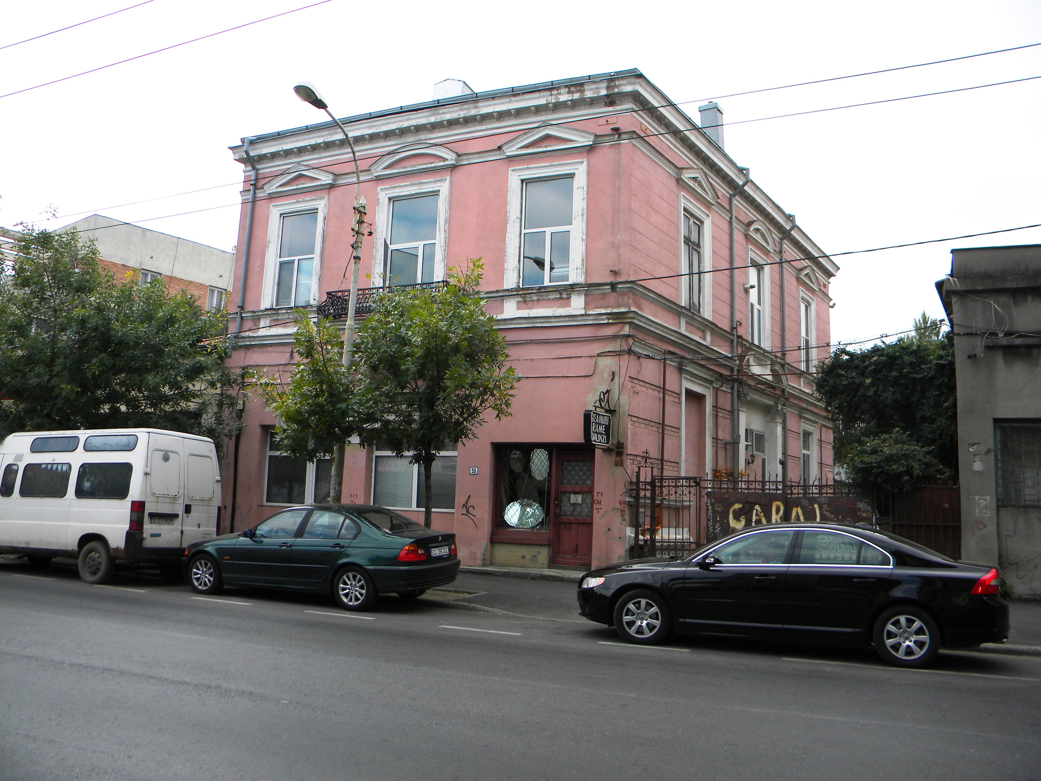 Bucuresti, Romania, Casa pe Calea Grivitei nr. 59, sect.1